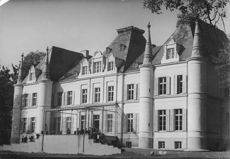 Bernau, Schloss Lanke, Tbc-Krankenhaus Zentralbild Sturm 12.10.1950 Neues Tbc-Krankenhaus Berlins. Anfang Oktober 1950 wurde in Lanke bei Bernau, in der Nähe Berlins, ein neues Tbc-Krankenhaus fertiggestellt, das in Kürze mit 100 Kranken belegt werden wird. Der Ausbau dieses ehemaligen Junkerschlosses wurde vor einem halben Jahr begonnen und durch Aktivistenleistungen vorfristig beendet. UBz: Blick auf das neue Krankenhaus.